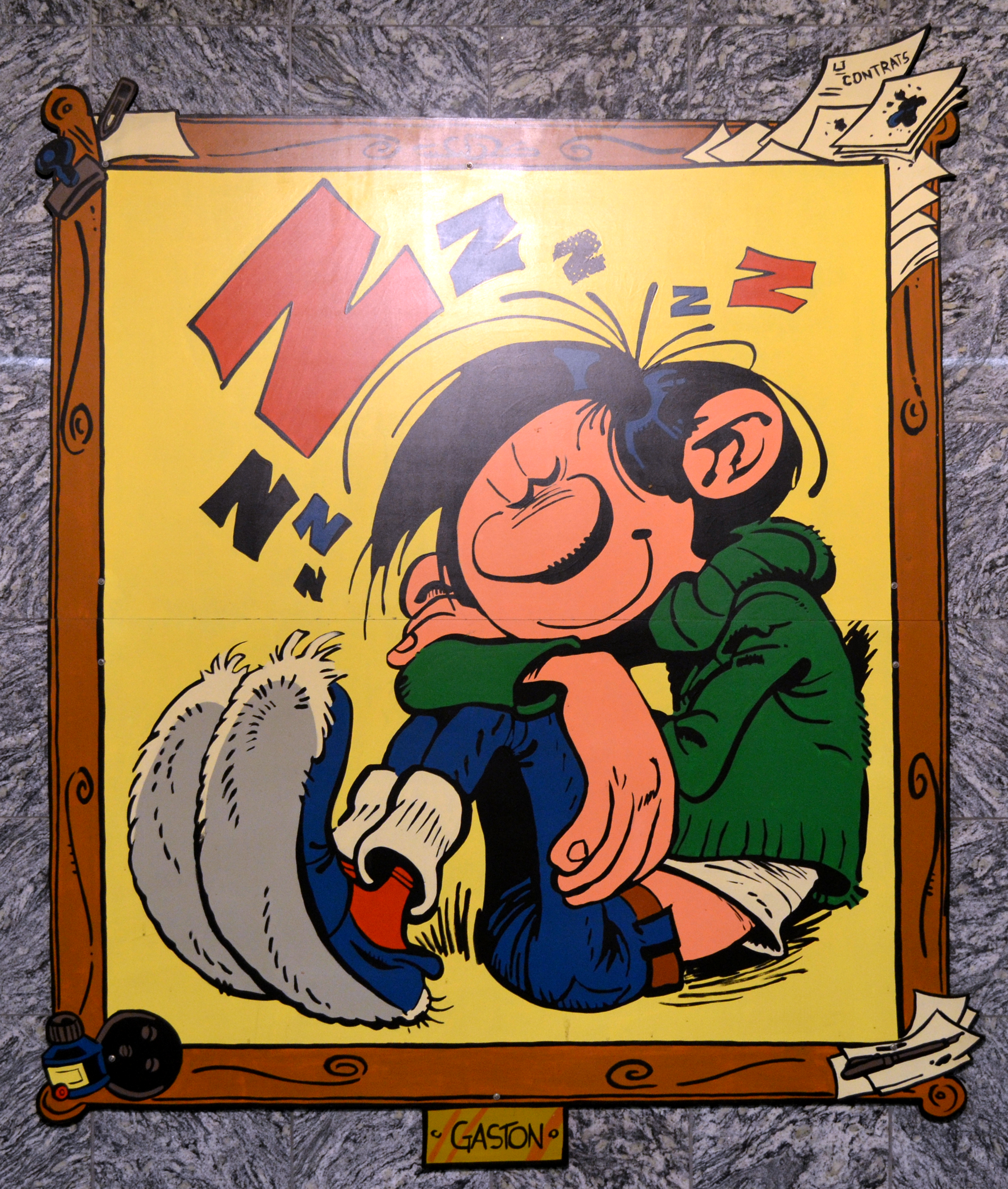 Gaston-Cartoon in einer Station der Stadtbahn Charleroi